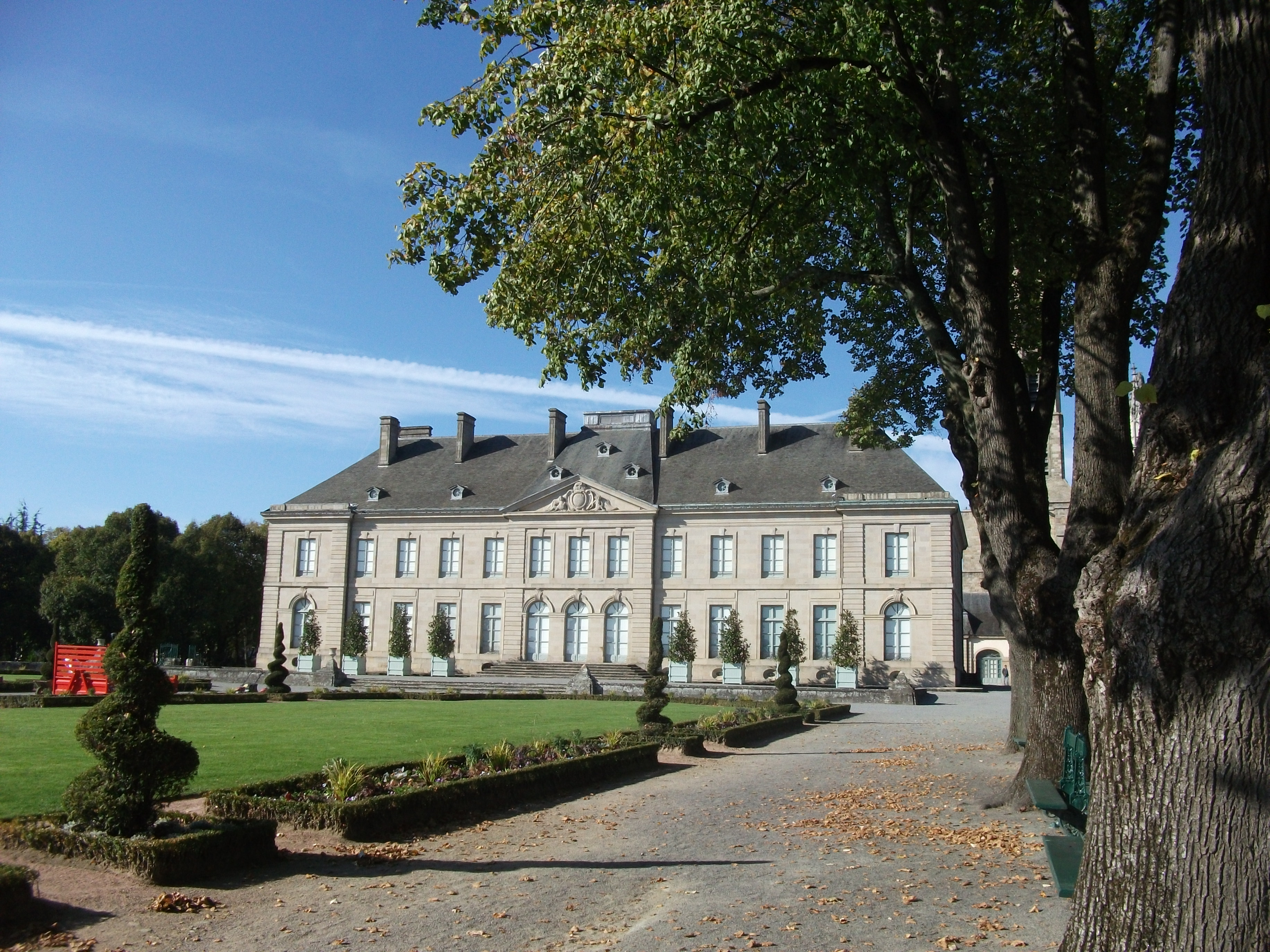 Palais épiscopal de Limoges.